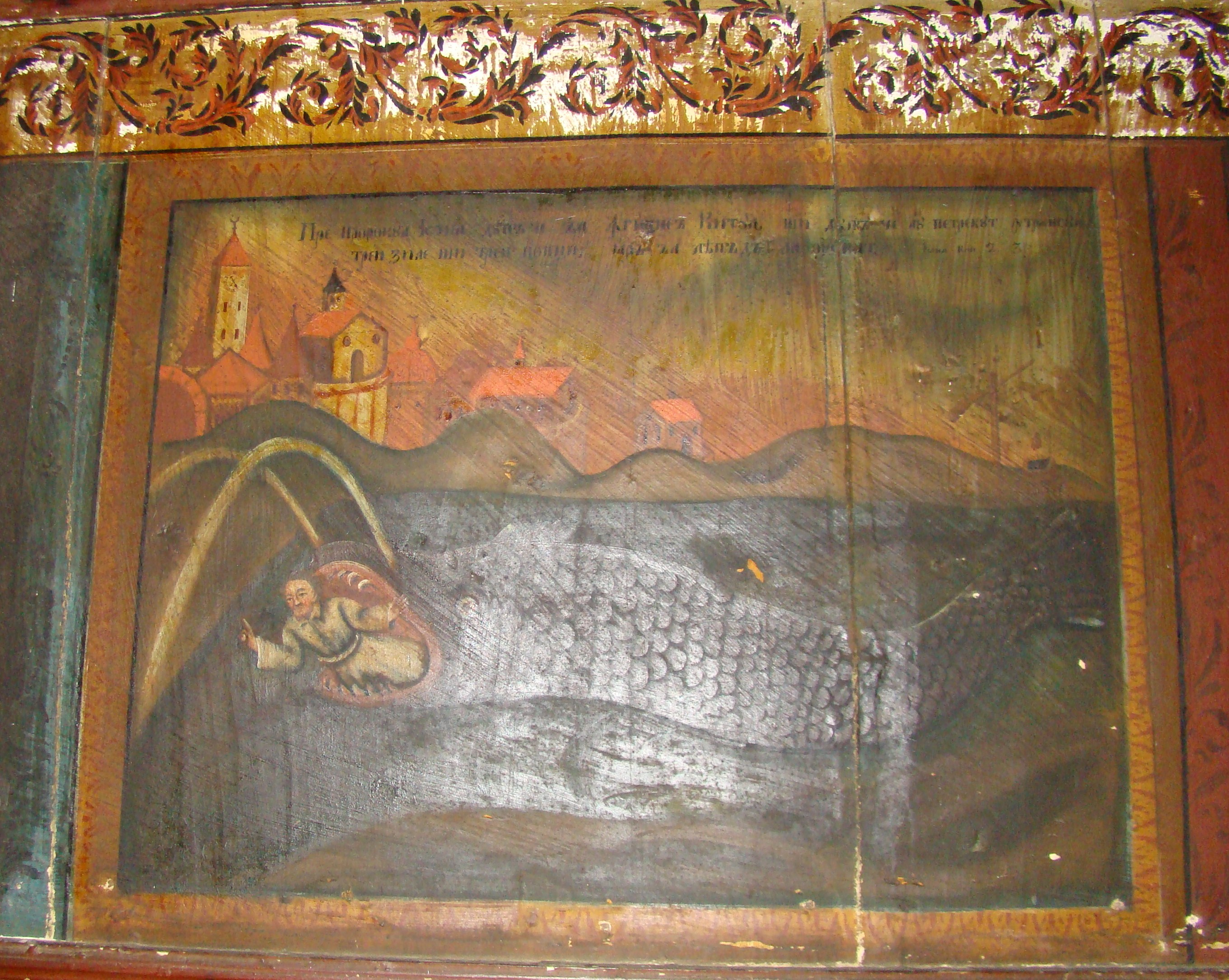 Biserica „Sf. Arhangheli Mihail și Gavriil” din Răstoci”, județul Sălaj